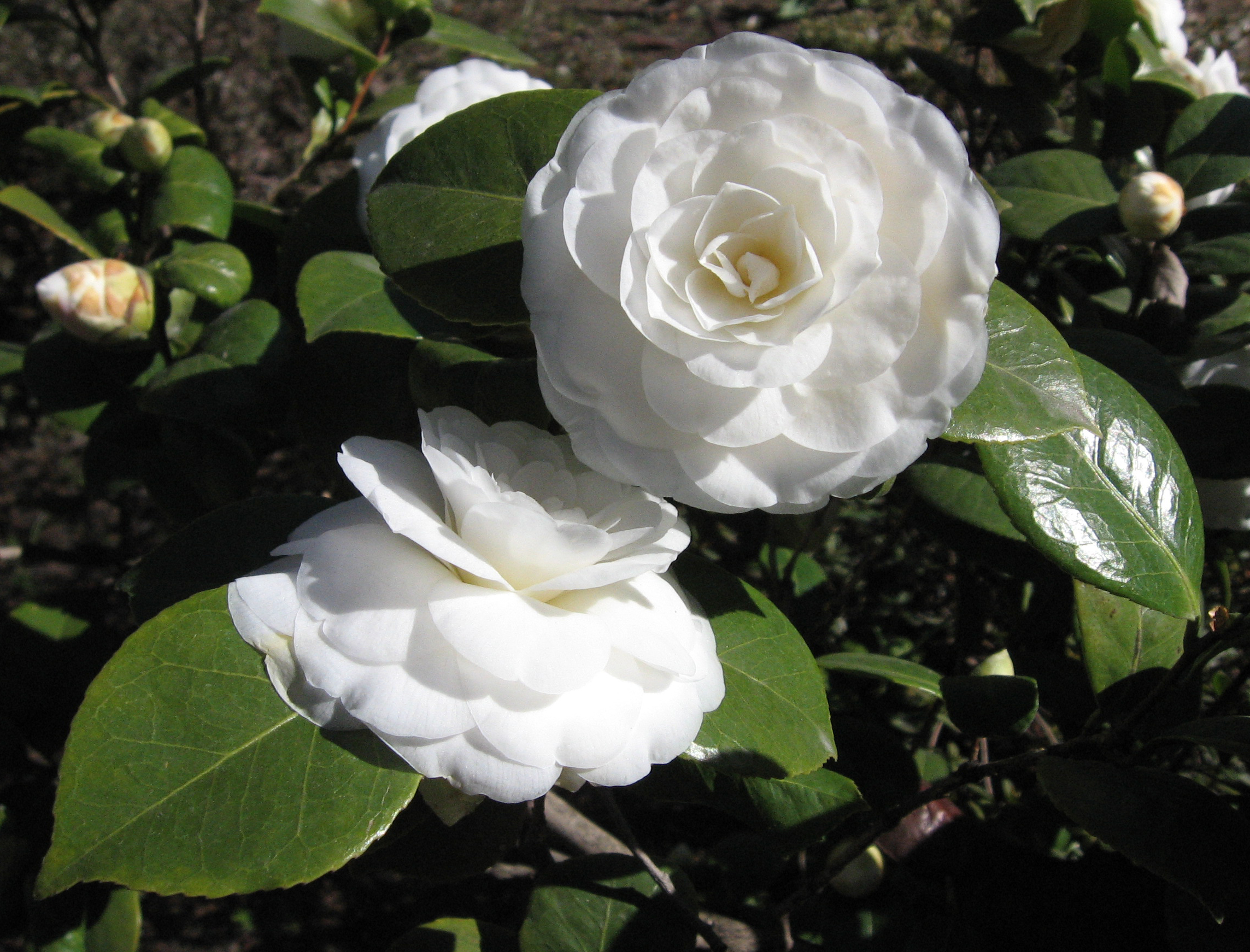 Camellia japonica 'Mathotiana Alba'. Real Jardín Botánico, Madrid, España.